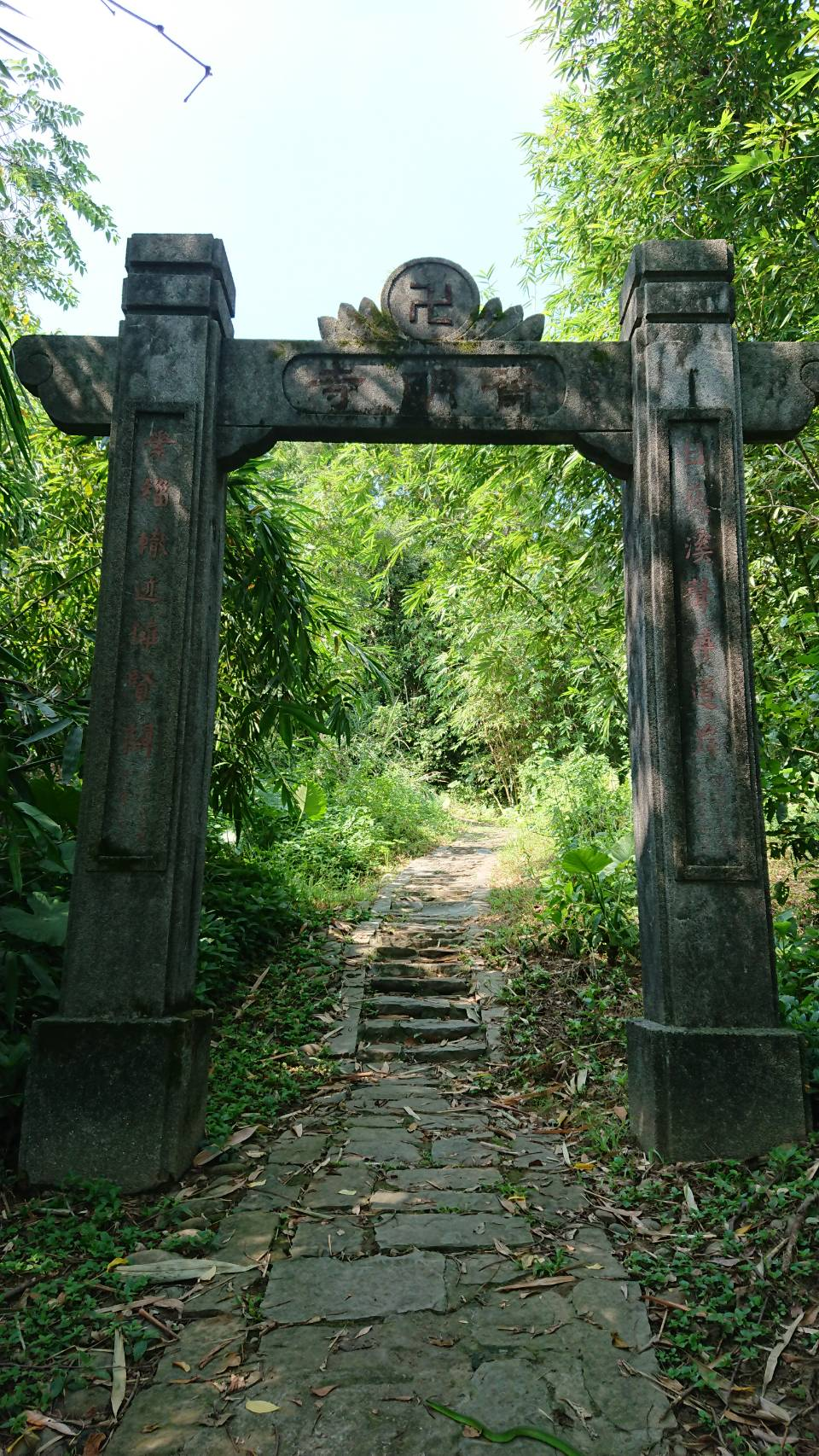 齋明寺古道-牌坊